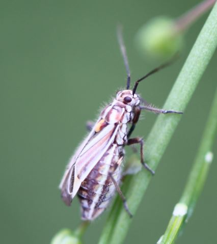 Horistus orientalis, Weibchen, am 2. Juni 2018 in der Schwetzinger Hardt an einem wilden Spargel